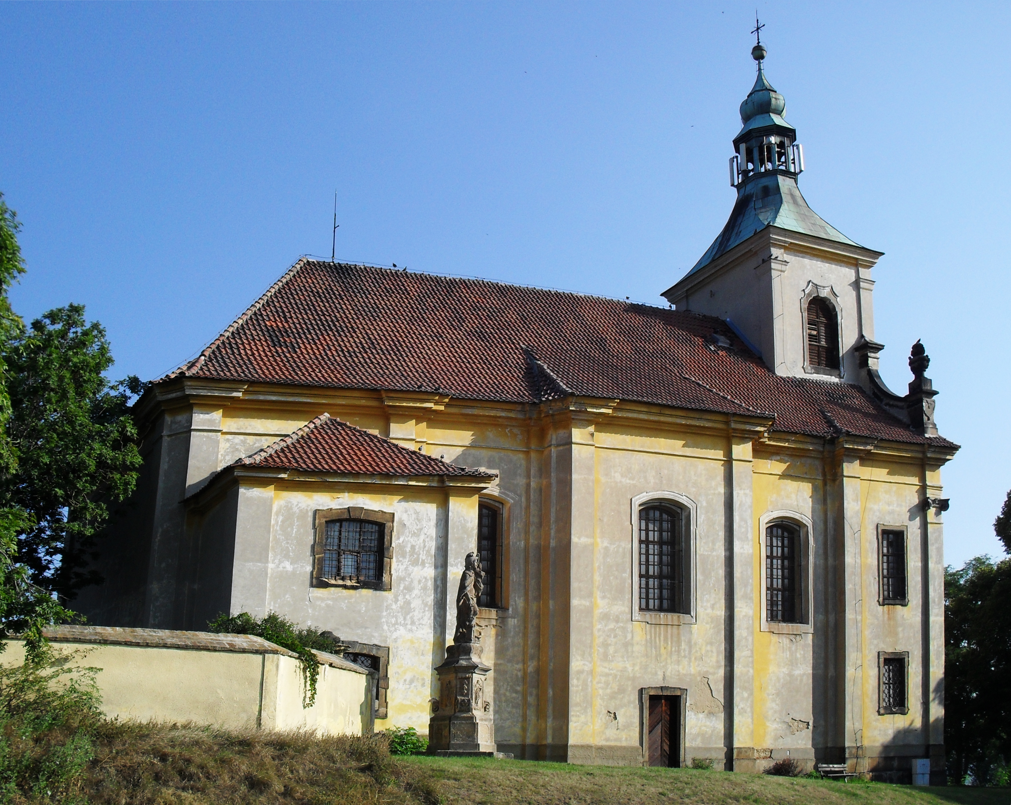 Kostel Povýšení sv. Kříže (Vtelno), návrší na Z okraji obce, Vtelno